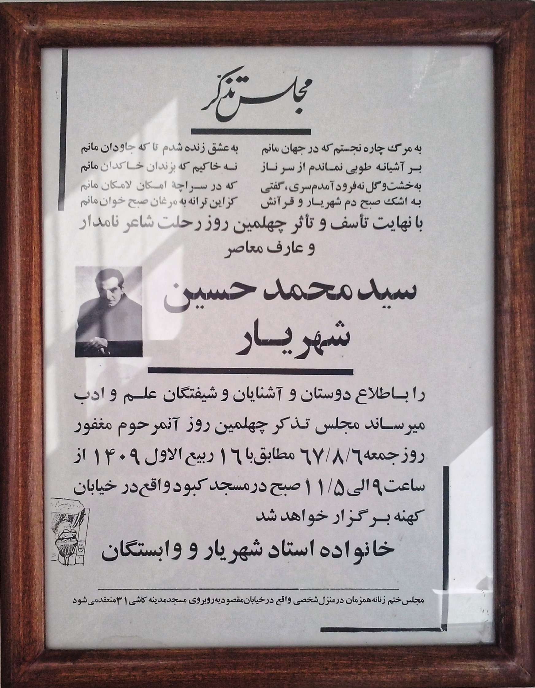 برگه اعلامیه مراسم چهلم محمدحسین شهریار.